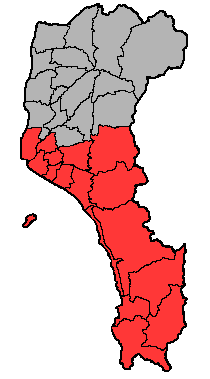 中文（台灣）: 屏東第三選舉區